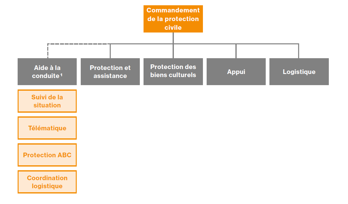 Organisation d'une organisation (bataillon) de la Protection civile suisse